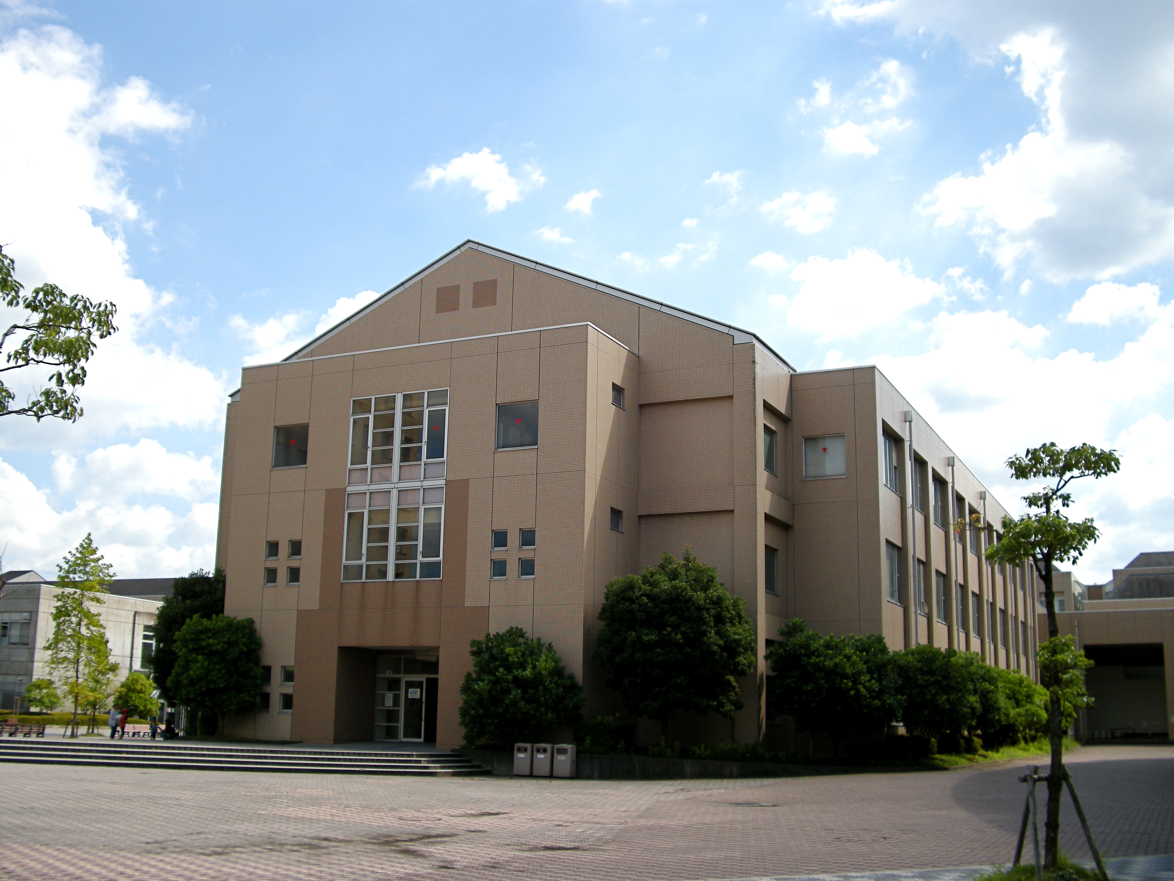 Prism House (Biwako Kusatsu Campus, Ritsumeikan University, Japan)